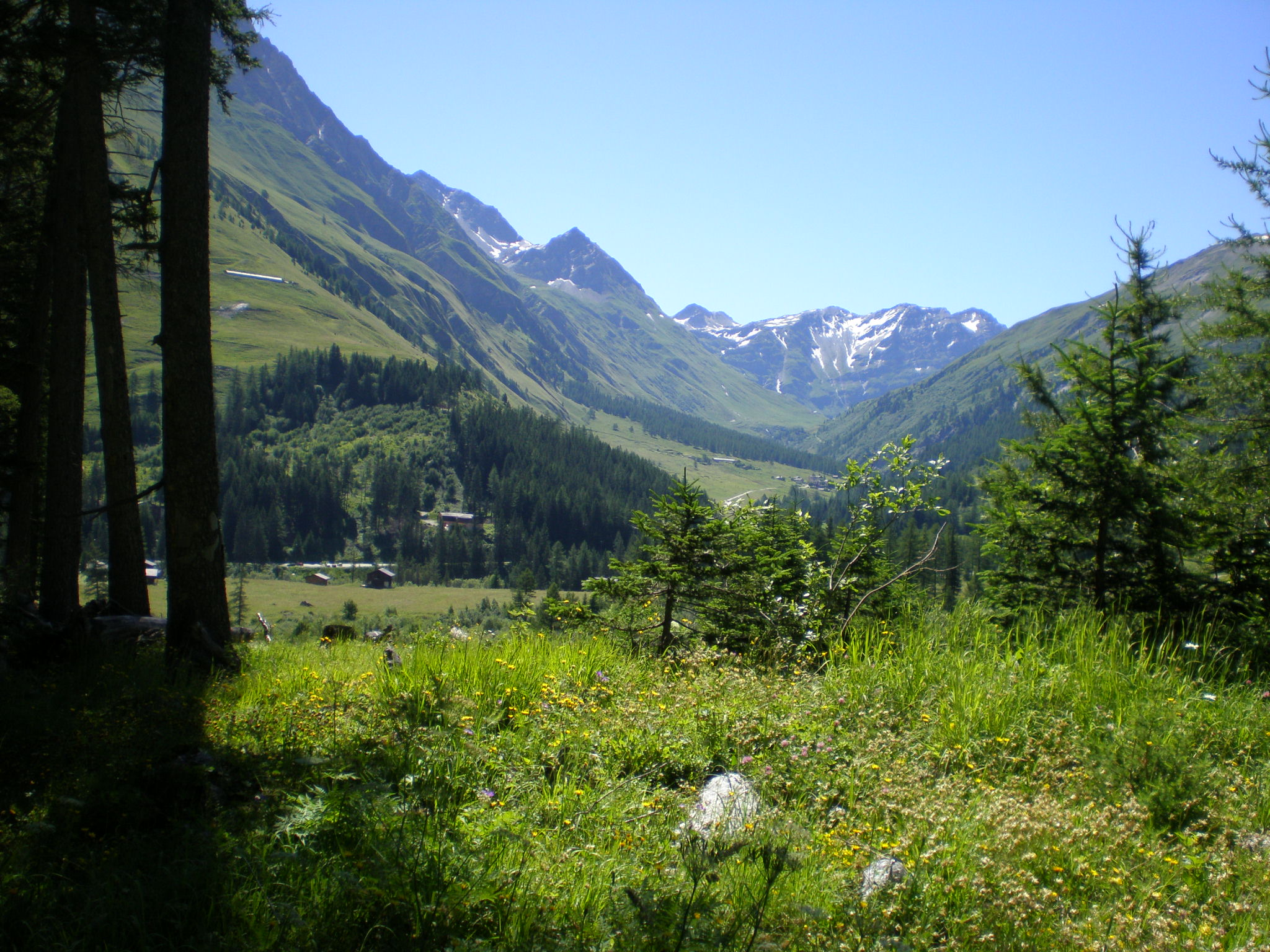 Photo du Val Ferret Suisse